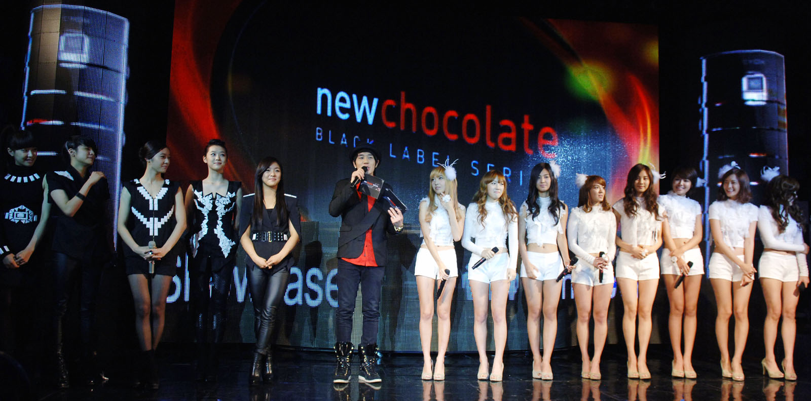 LG 뉴초콜릿폰 쇼케이스